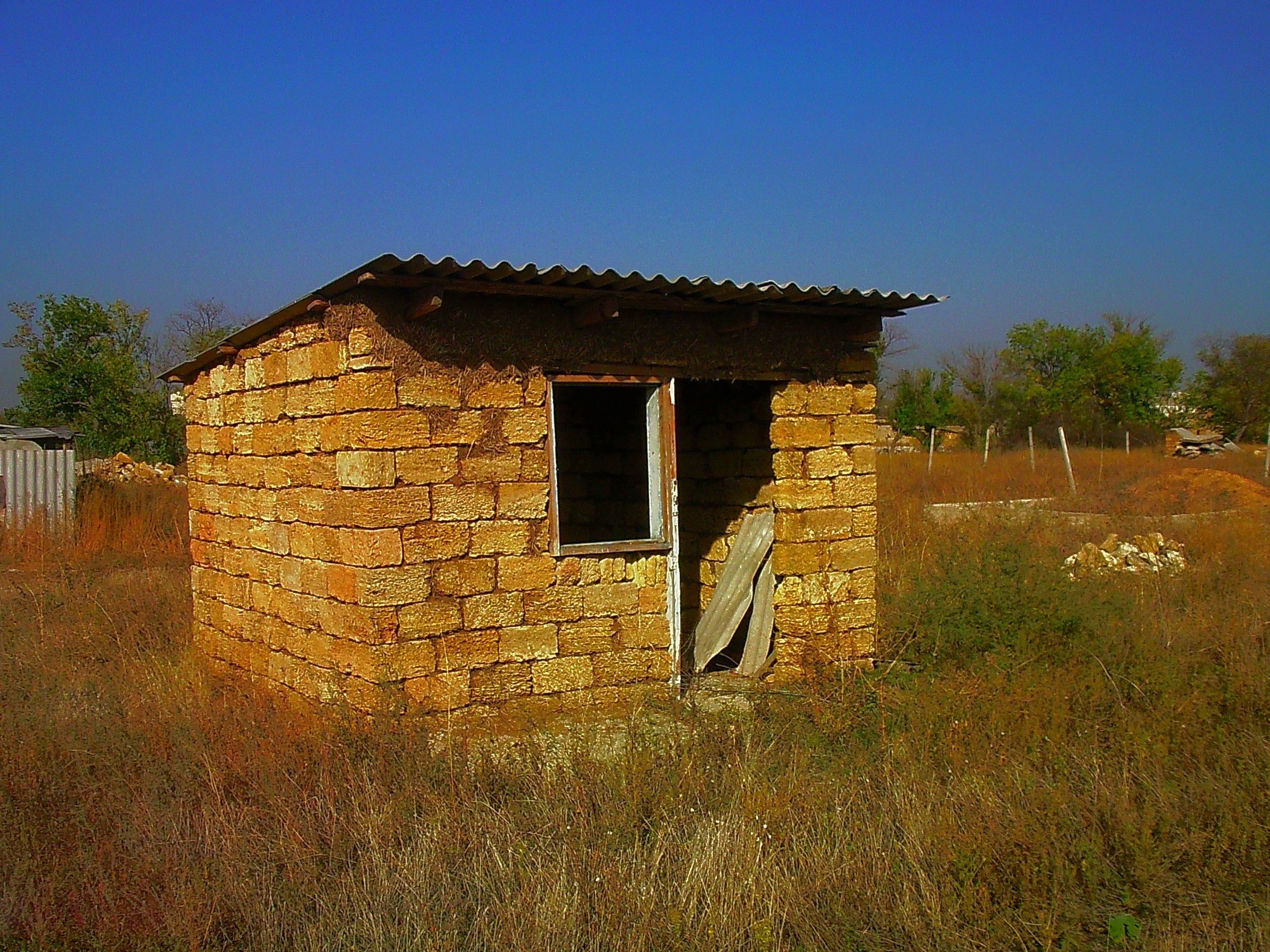 самозахваты